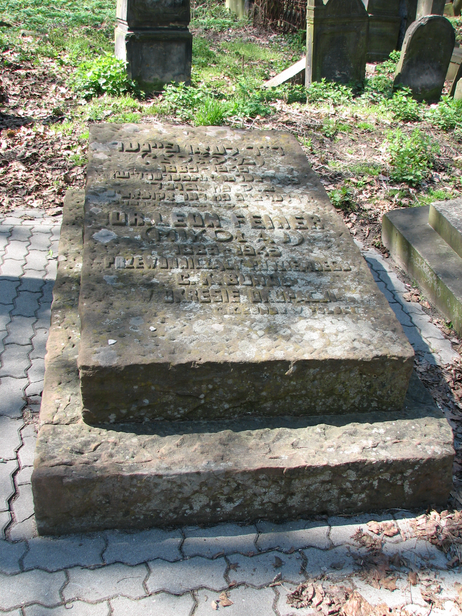 Leon Feiner grób - Warszawa, Cmentarz Żydowski, ul. Okopowa